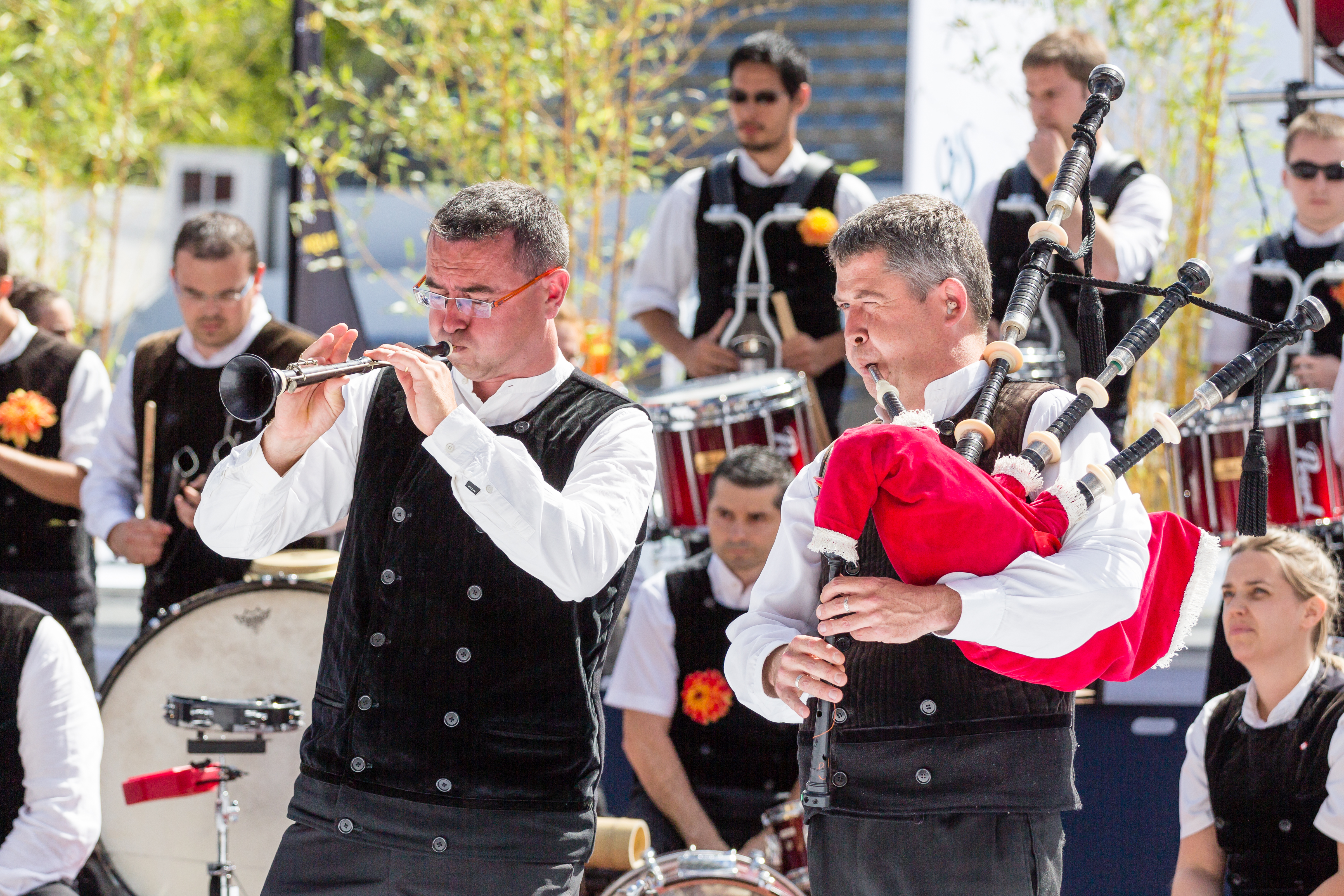 Le bagad Cap Caval lors du championnat national des bagadoù (première catégorie) au FIL 2012.